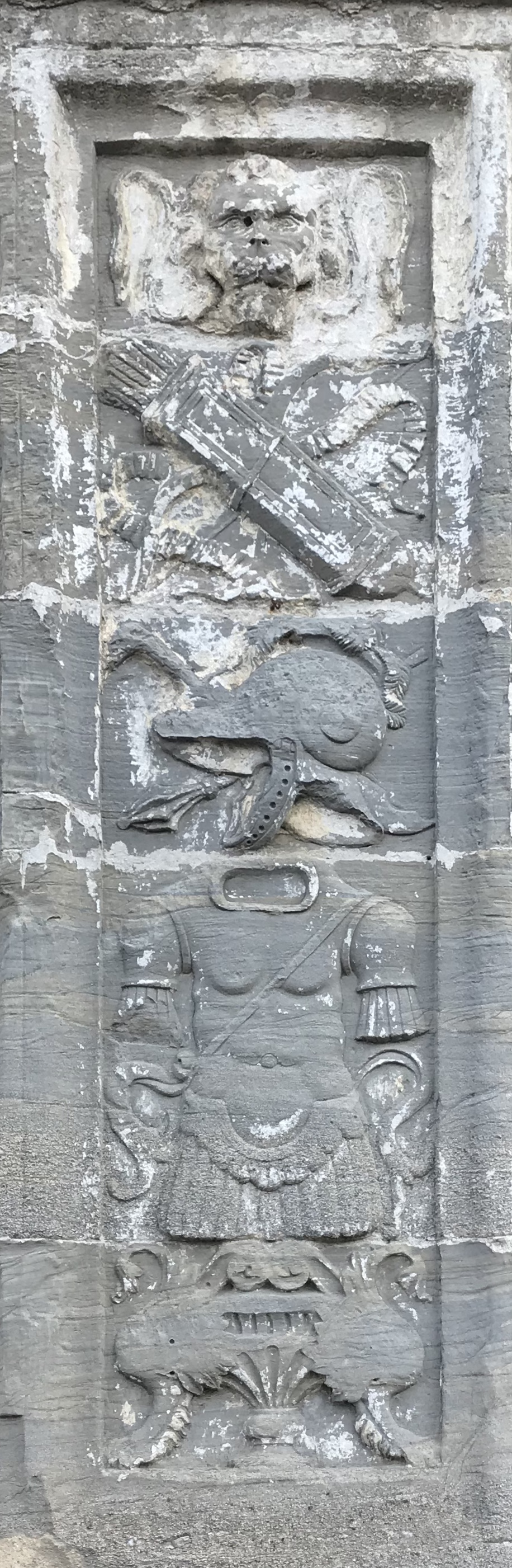 Chiesa di Santa Maria del Soccorso a Caccuri